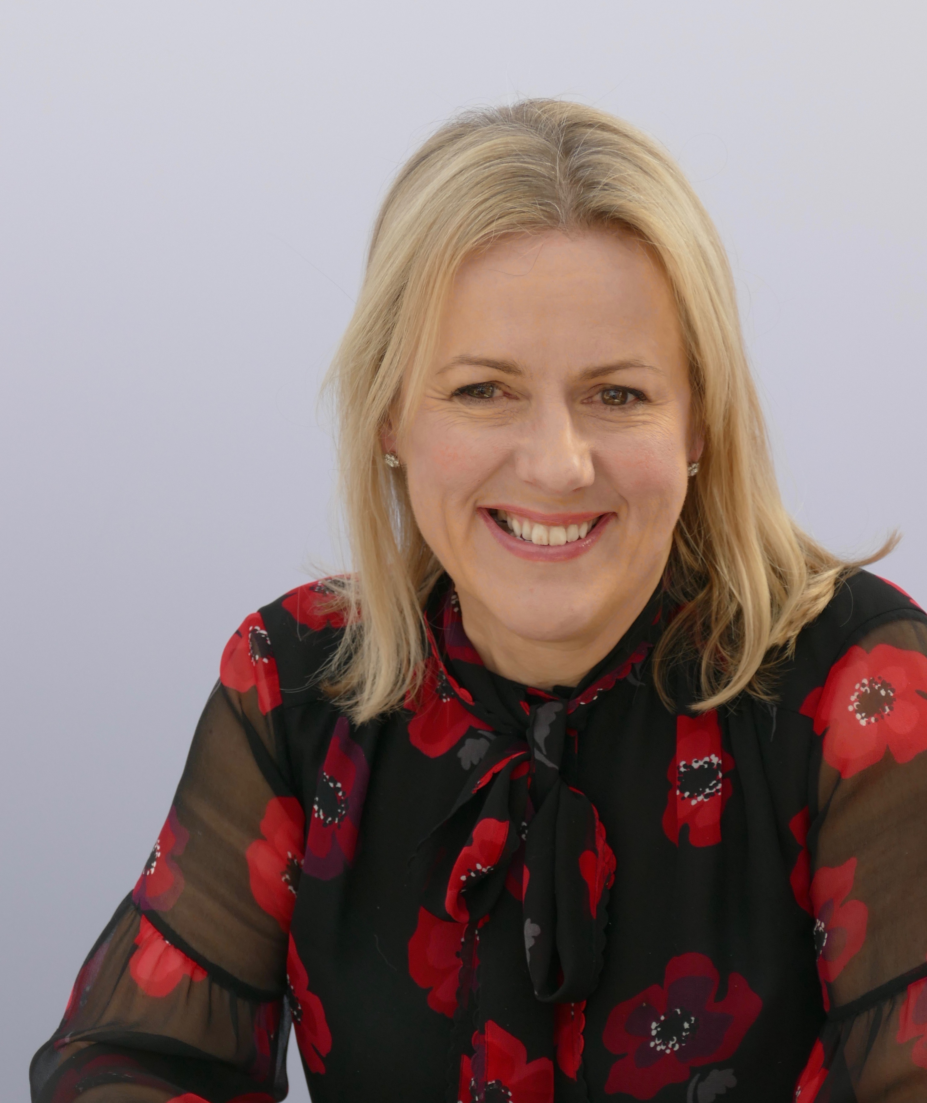 Jojo Moyes stellt auf der Leipziger Buchmesse 2018 ihren Roman "Mein Herz in zwei Welten" vor.